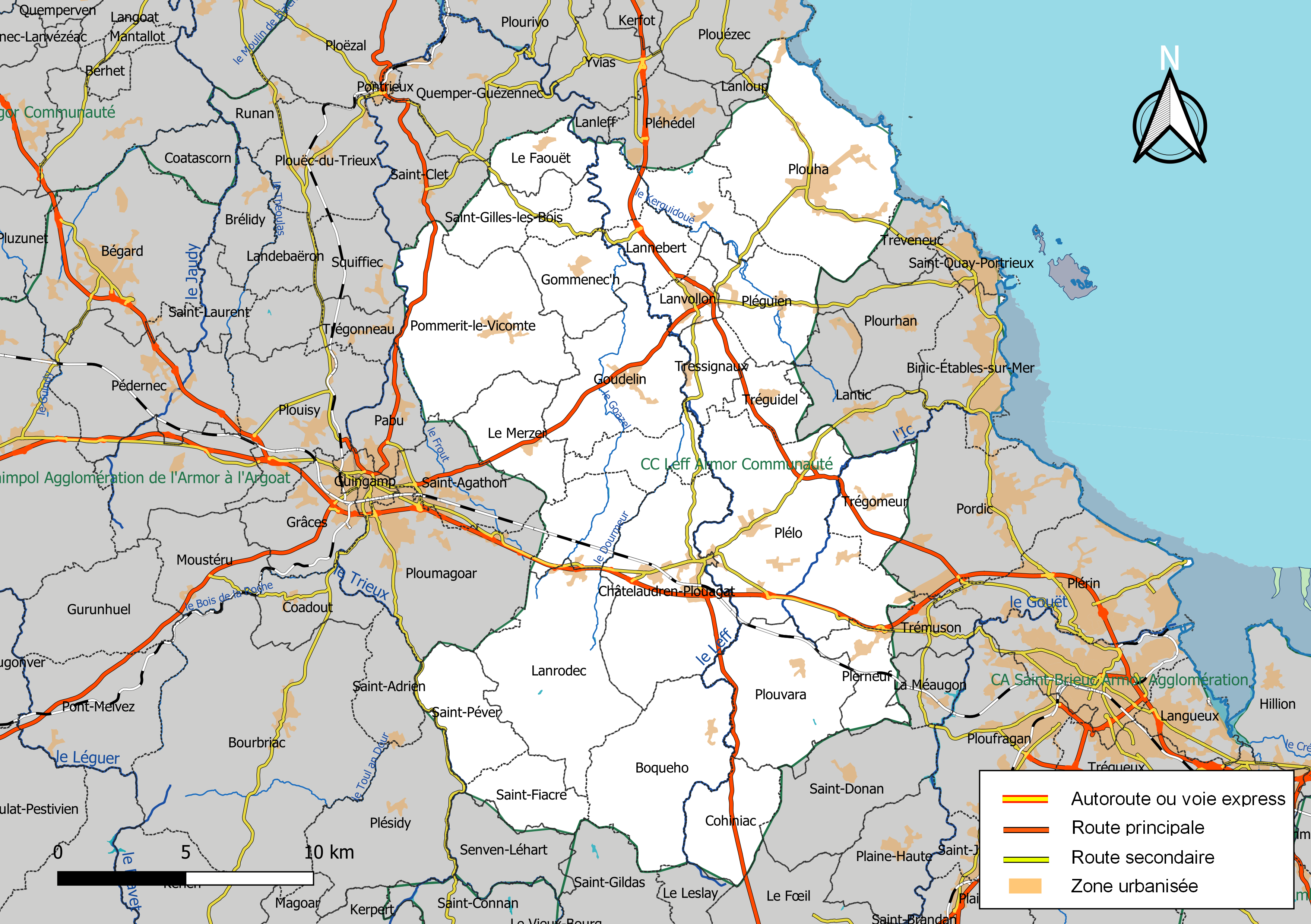 Carte géographique de la Communauté de communes Leff Armor Communauté, département des Côtes-d'Armor, France. Composition au 1er janvier 2019.